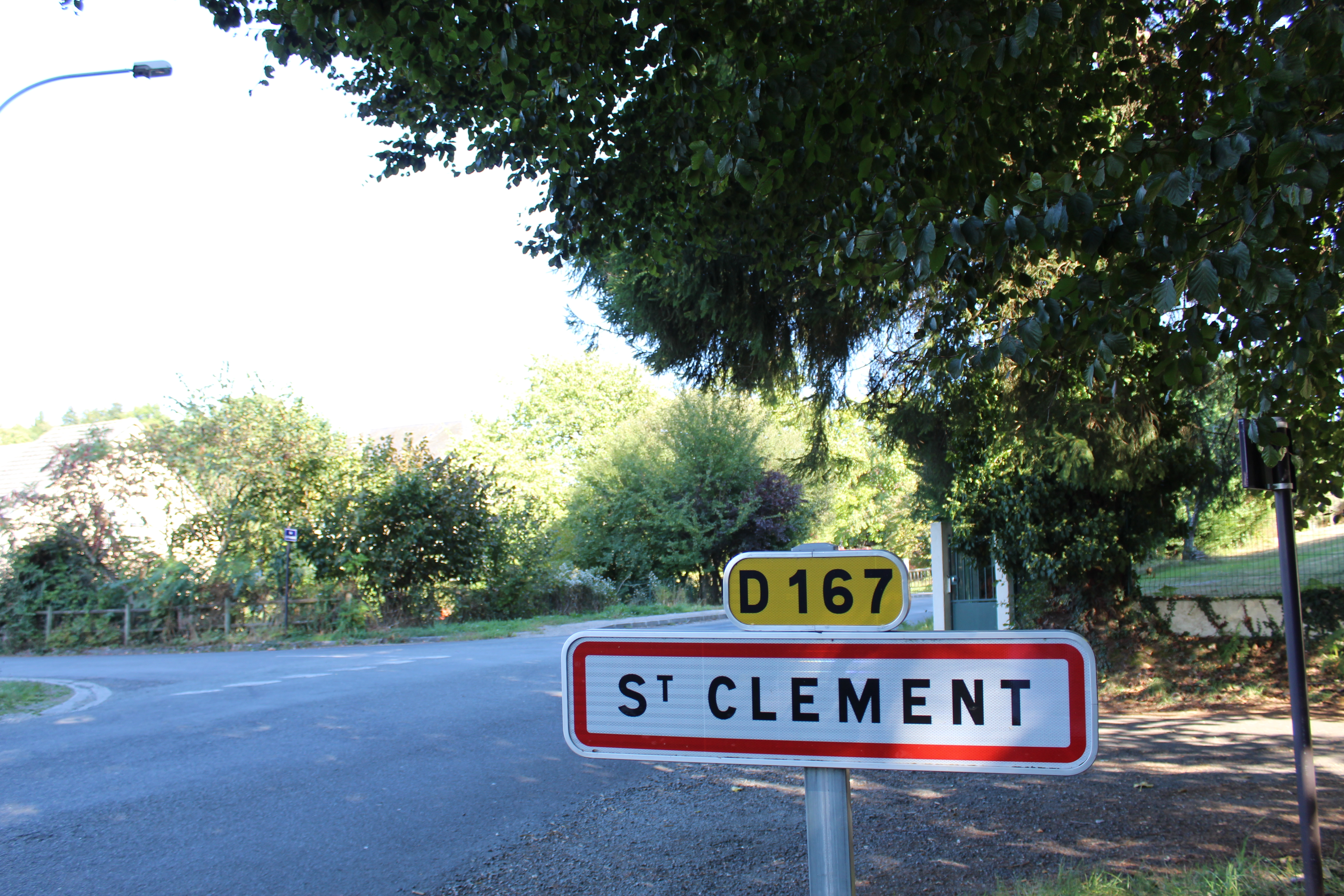 Entrée du village